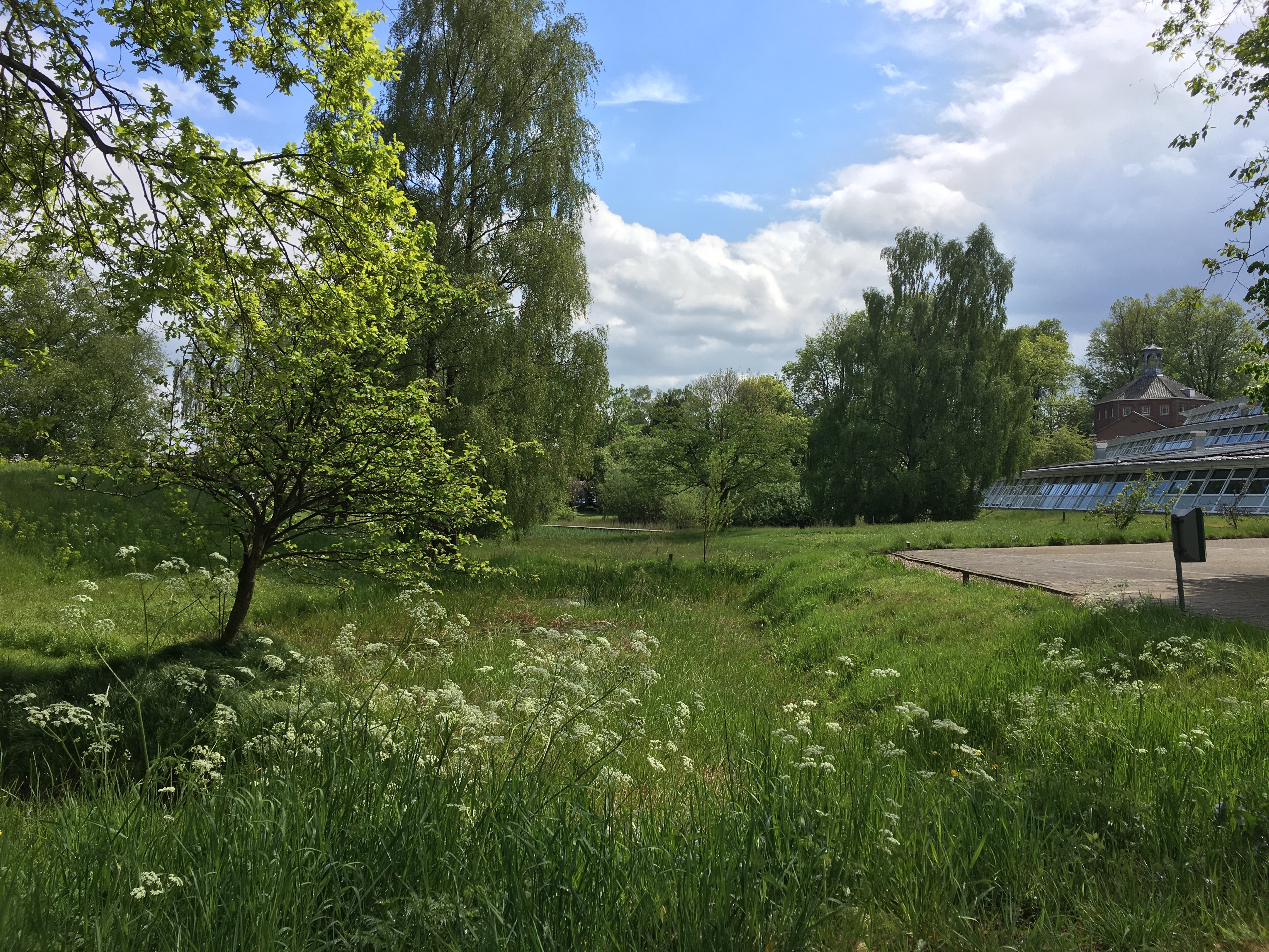 Heemtuin van Larenstein University of Applied Sciences met op de achtergrond de Larenstein Chapel en het schoolgebouw